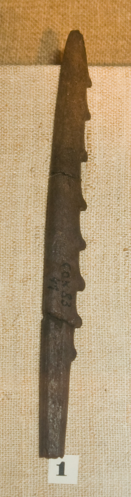 Гарпун. (Кость), VII-VI тысячелетие до н.э. Археологические раскопки 1983-1984, Стоянка у деревни Соколок. Лужский район Ленинградской области. ИИМК РАН. Государственный музей истории Санкт-Петербурга.